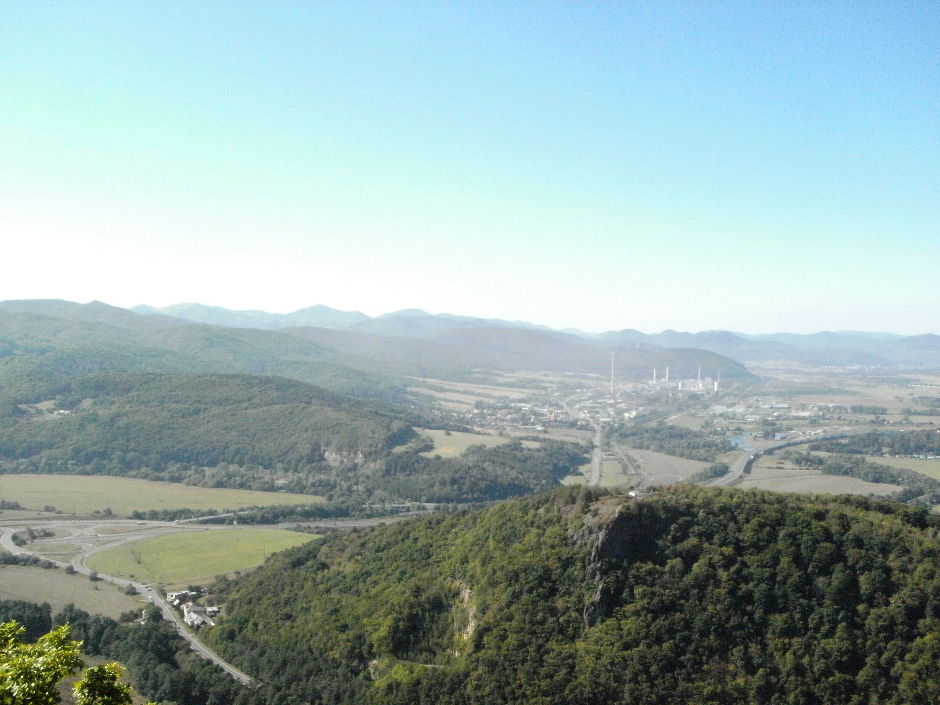 Pohľad na mesto Žiar nad Hronom z vrchu Kamenica